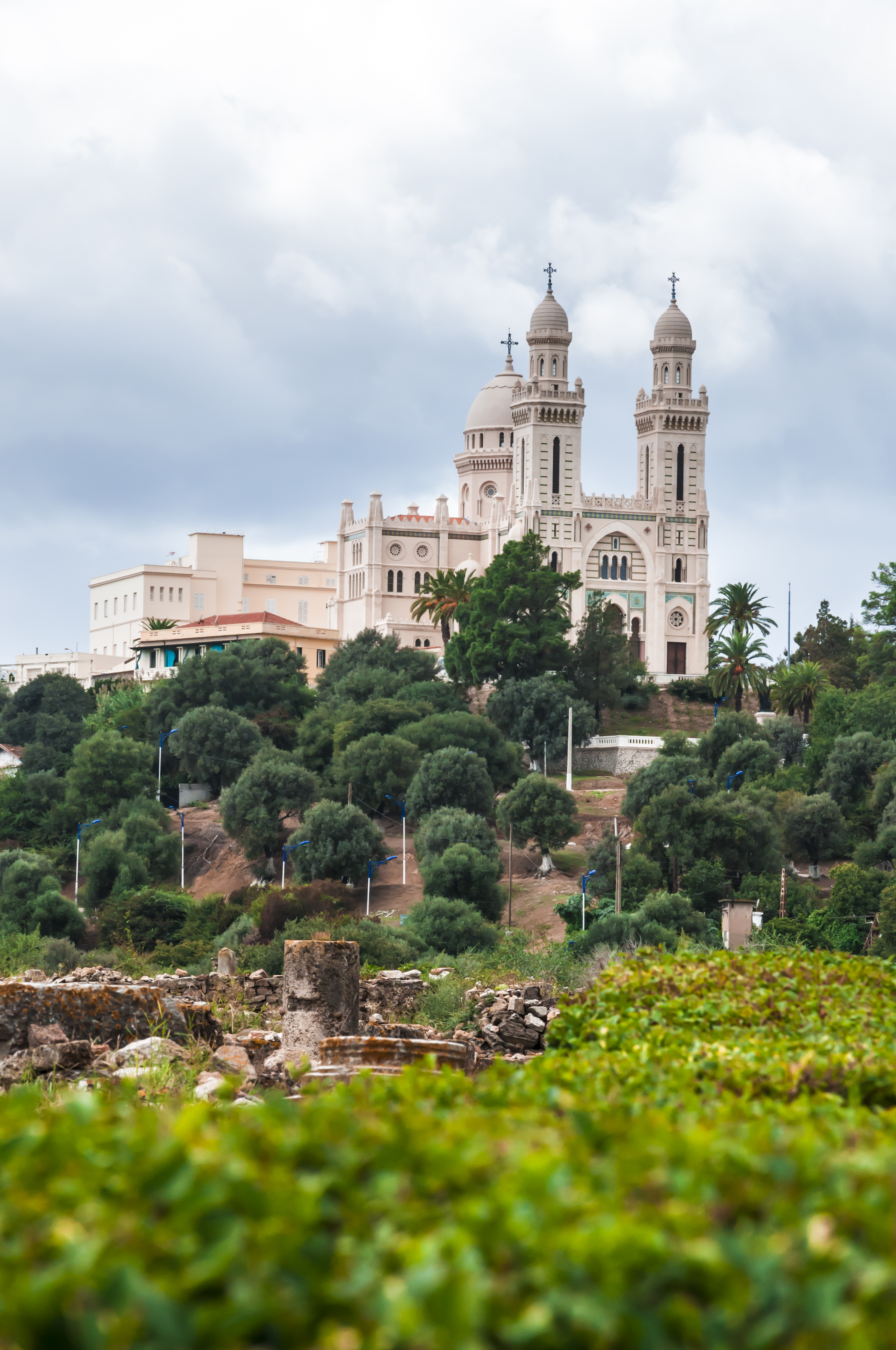 vue de la basilique saint augustin depuis les ruines romaine wilaya de annaba algerie